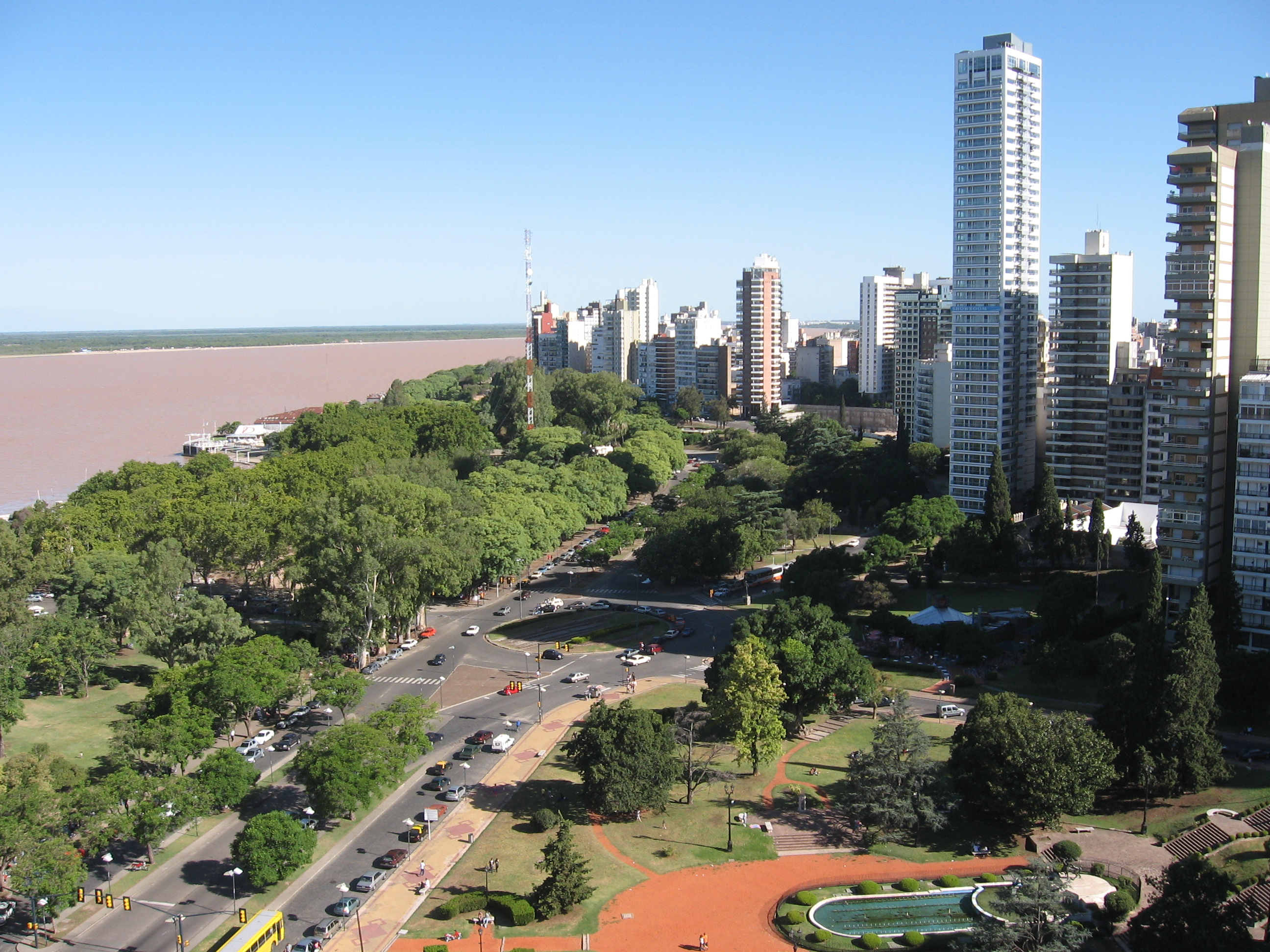 Rosario y parte del Río Paraná, vistos desde lo alto del Monumento a la Bandera